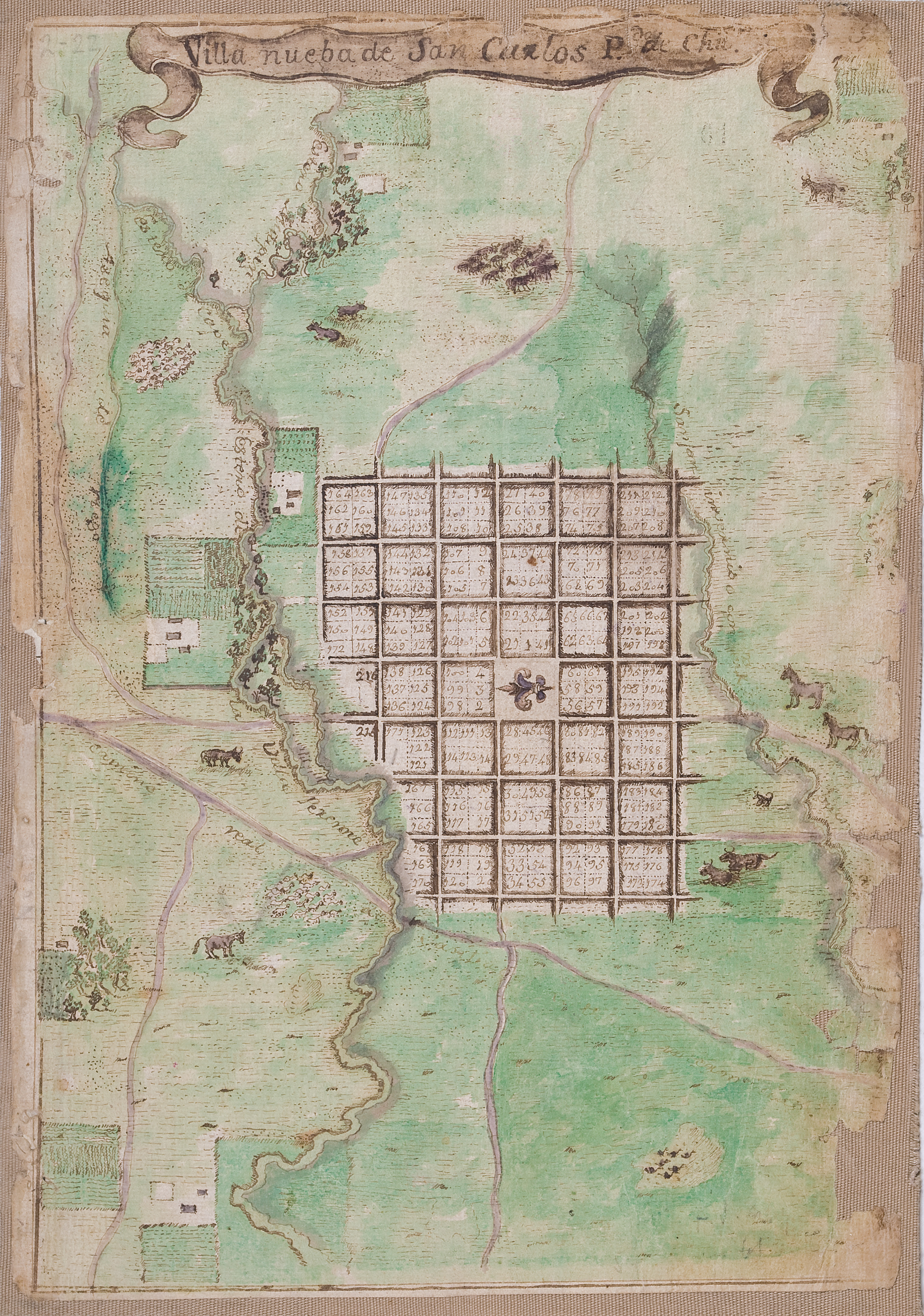 Plano de la Villa de San Carlos en 1805. Se establece la creación de 36 manzanas divididas en 120 solares. El trazado de damero se conserva hasta la actualidad. Es posible apreciar las calles Navotavo y Francisco Bilbao de Norte a Sur; y Ramón Freire y José Miguel Carrera de Este a Oeste